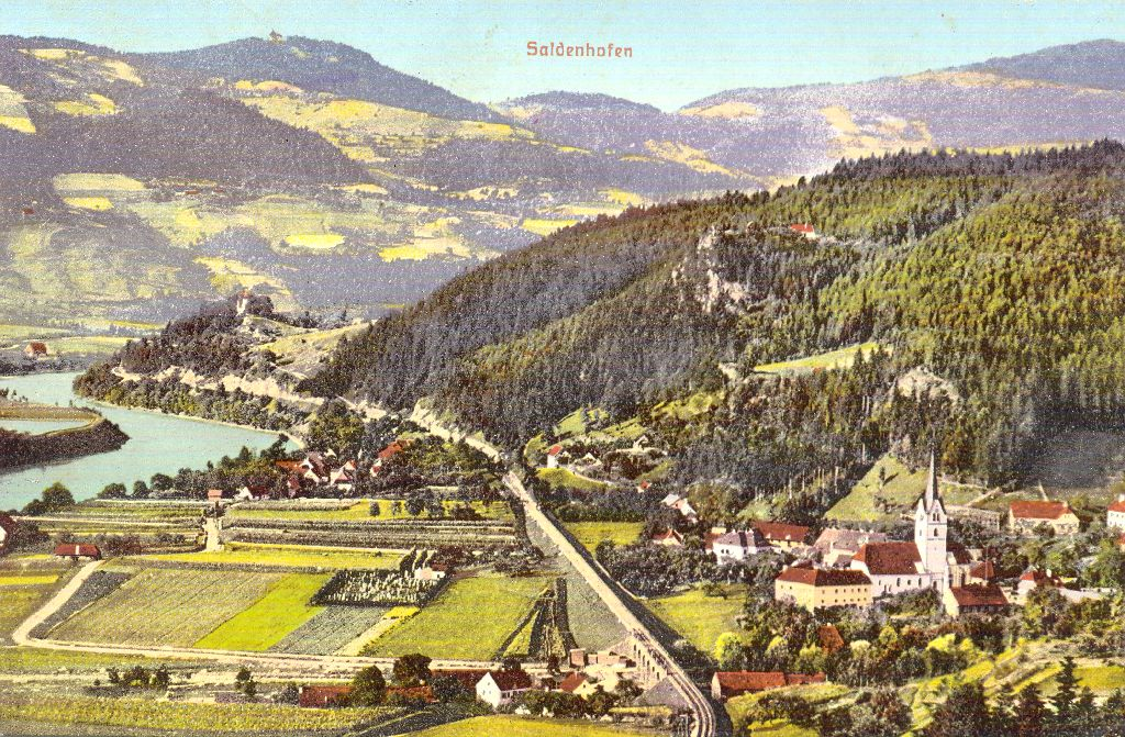 Razglednica Vuzenice.